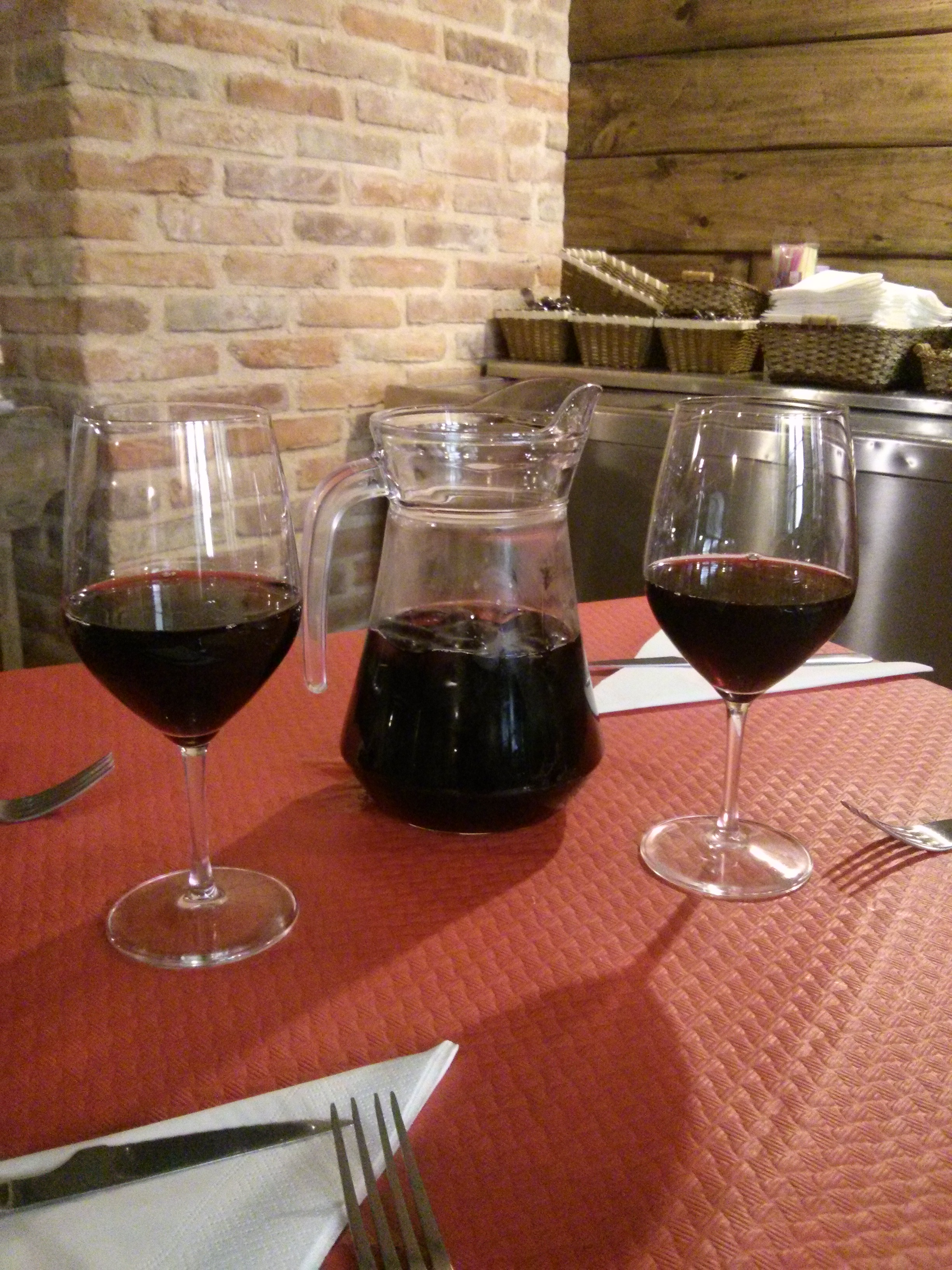 Jarro y copas de limonada de vino en Astorga (León, España).